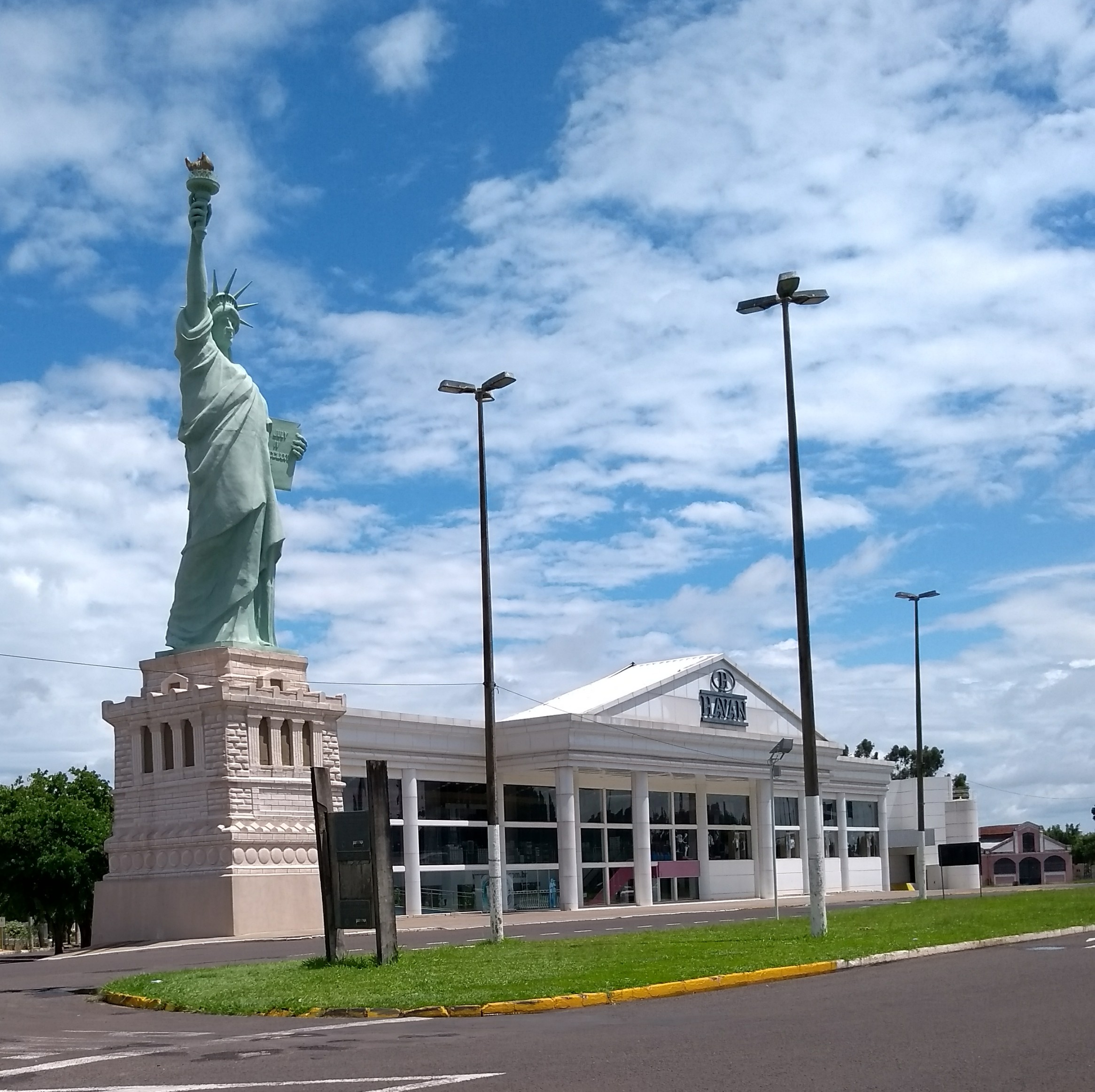 Prédio da Havan e a réplica da Estátua da Liberdade em Araçatuba. Ainda é possível ver o prédio da NOB (Estrada de Ferro Noroeste do Brasil) no canto direito.